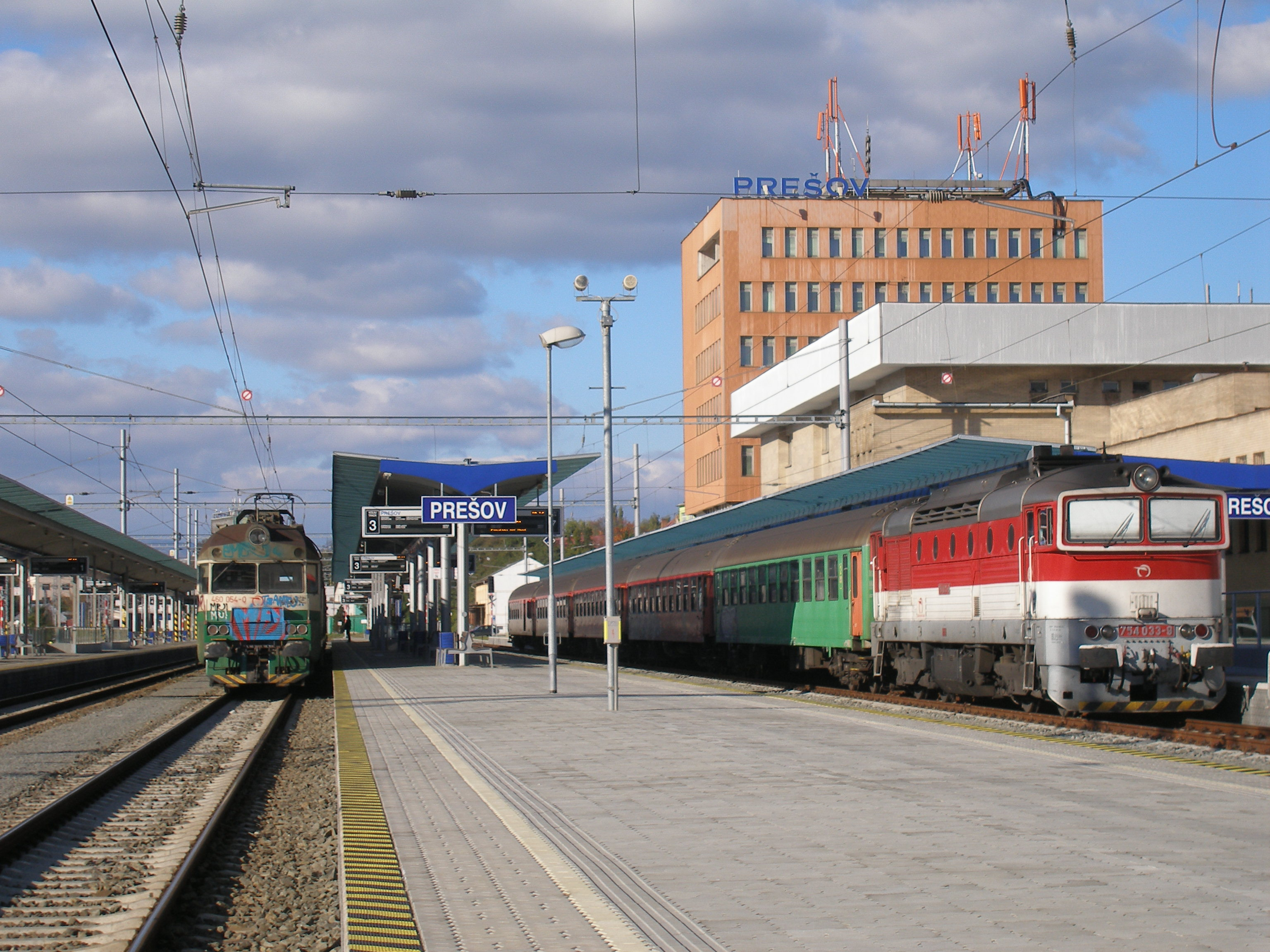 Železničná stanica v krajskom meste Prešov, región Šariš